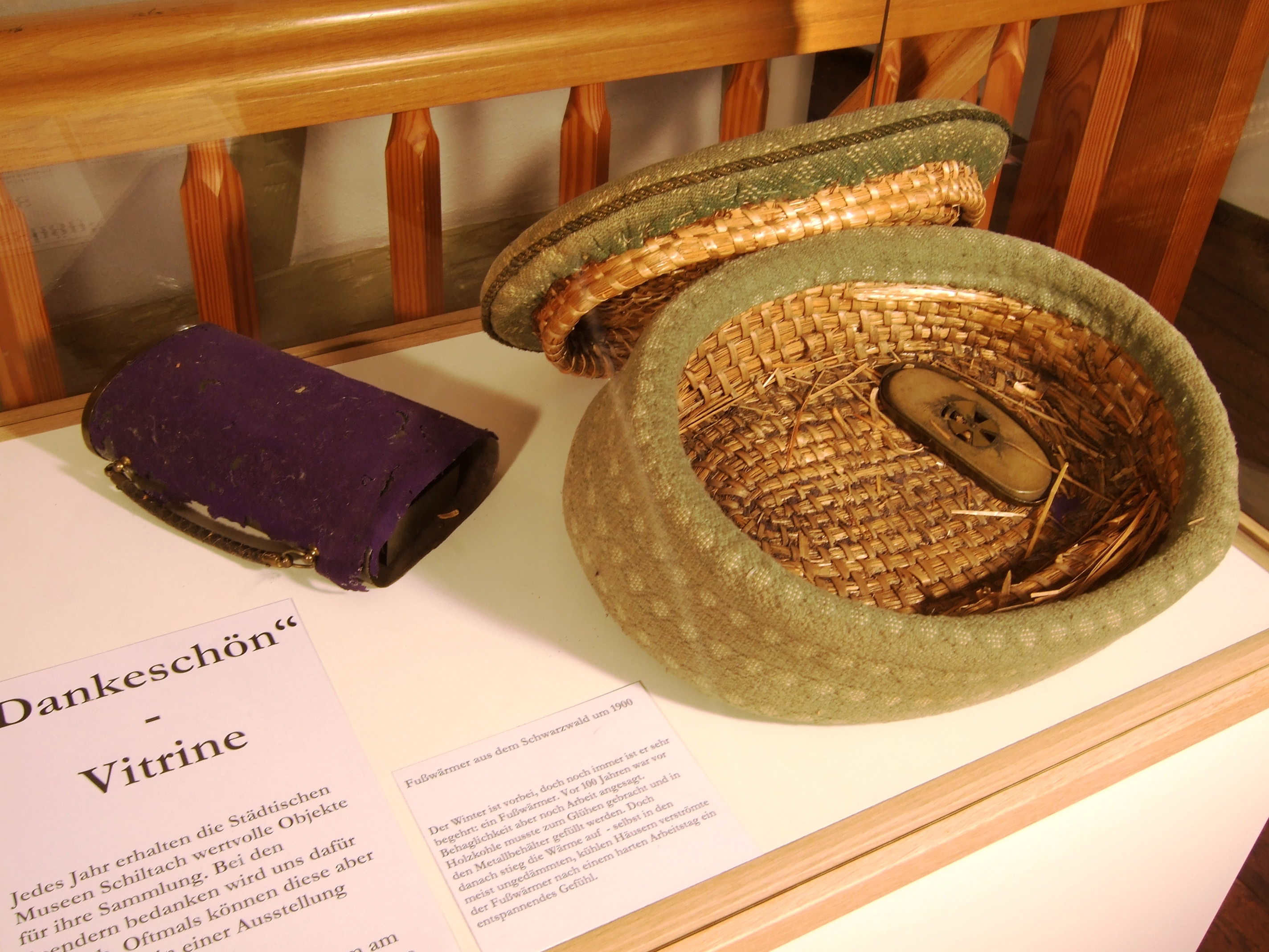 Dankeschön-Vitrine mit einem historischen Fußwärmer aus dem Schwarzwald im Schiltacher Museum am Markt, April 2017